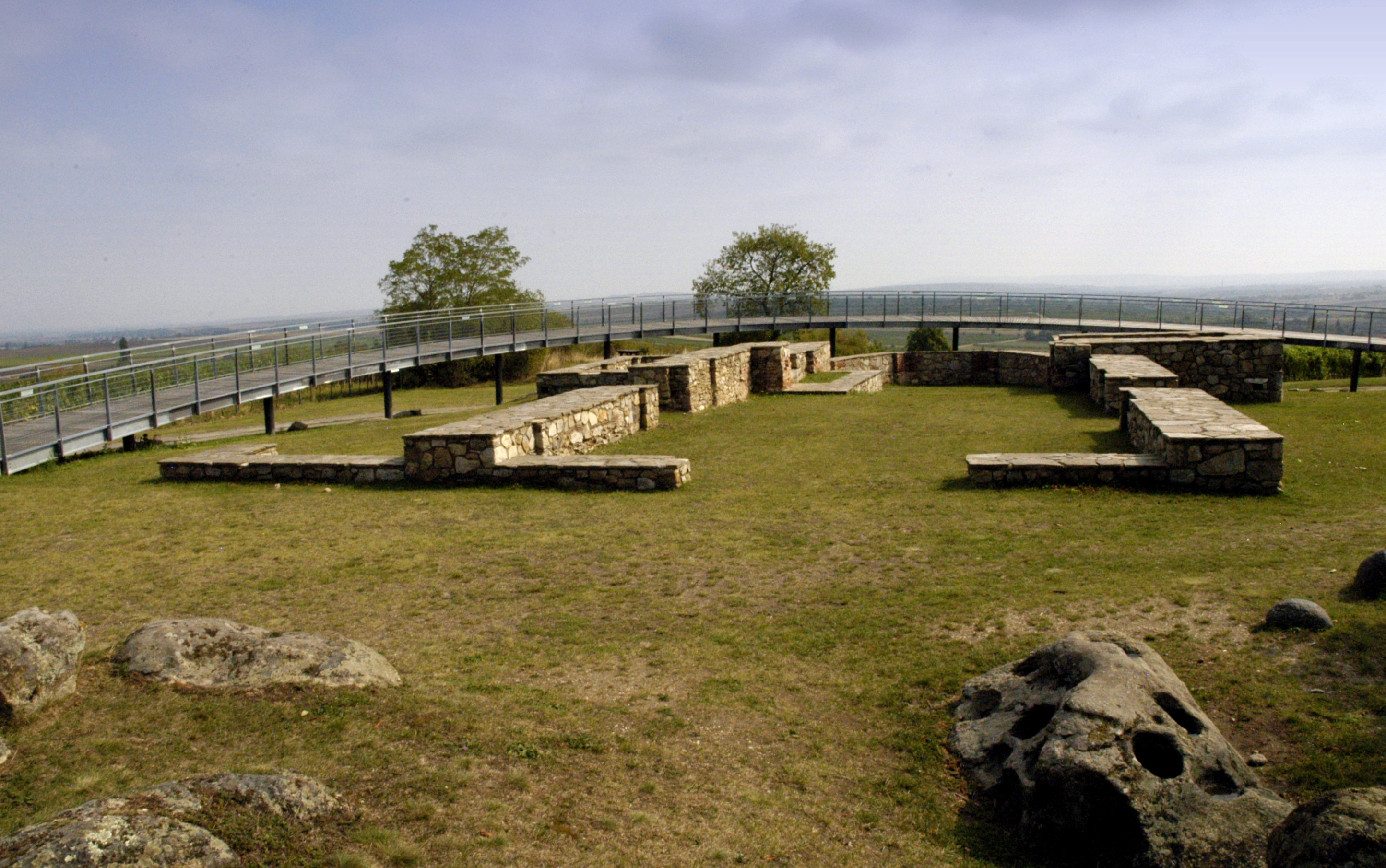 ehemalige Wallfahrtskirche Unsere Liebe Frau am Stein in Mitterretzbach, Gemeinde Retzbach (Niederösterreich), im Vordergrund der Heilige Stein (Schalenstein)